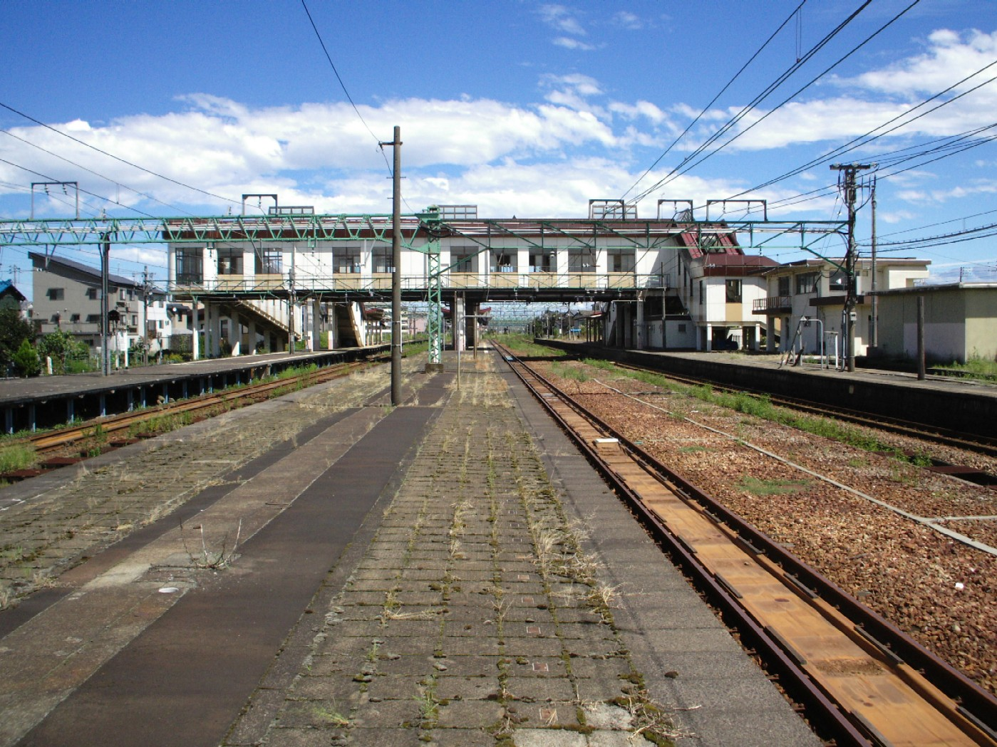 宮内駅プラットホーム